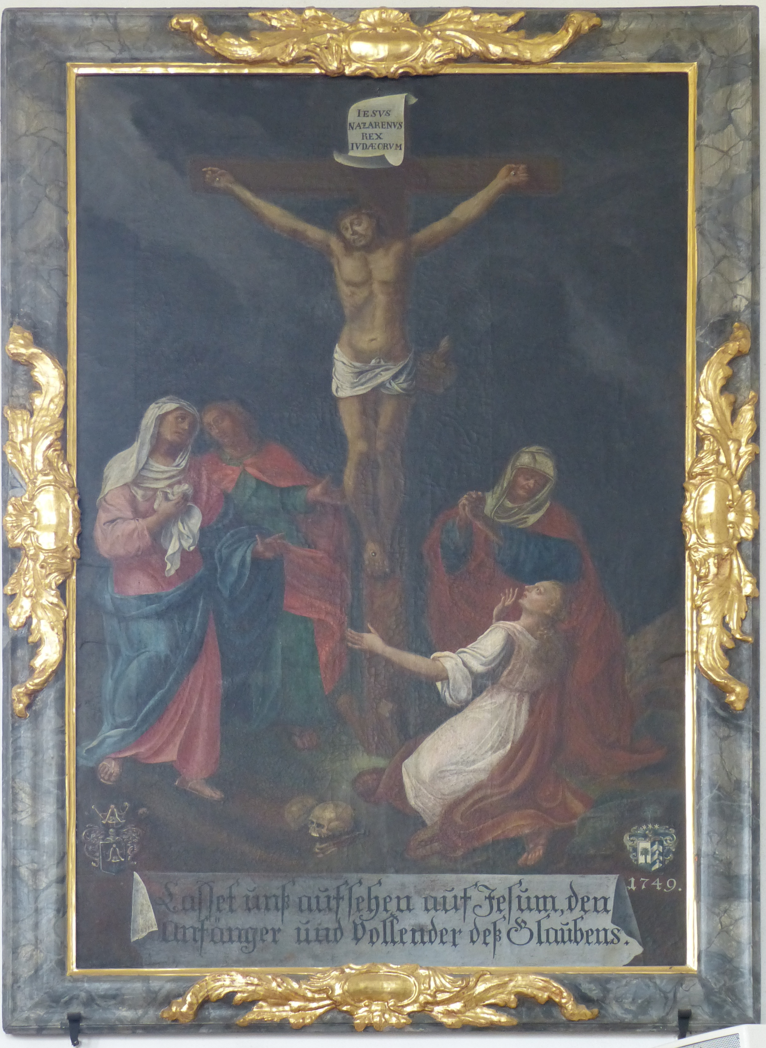 Unser Lieben Frauen, Lauben, Landkreis Unterallgäu, Bayern